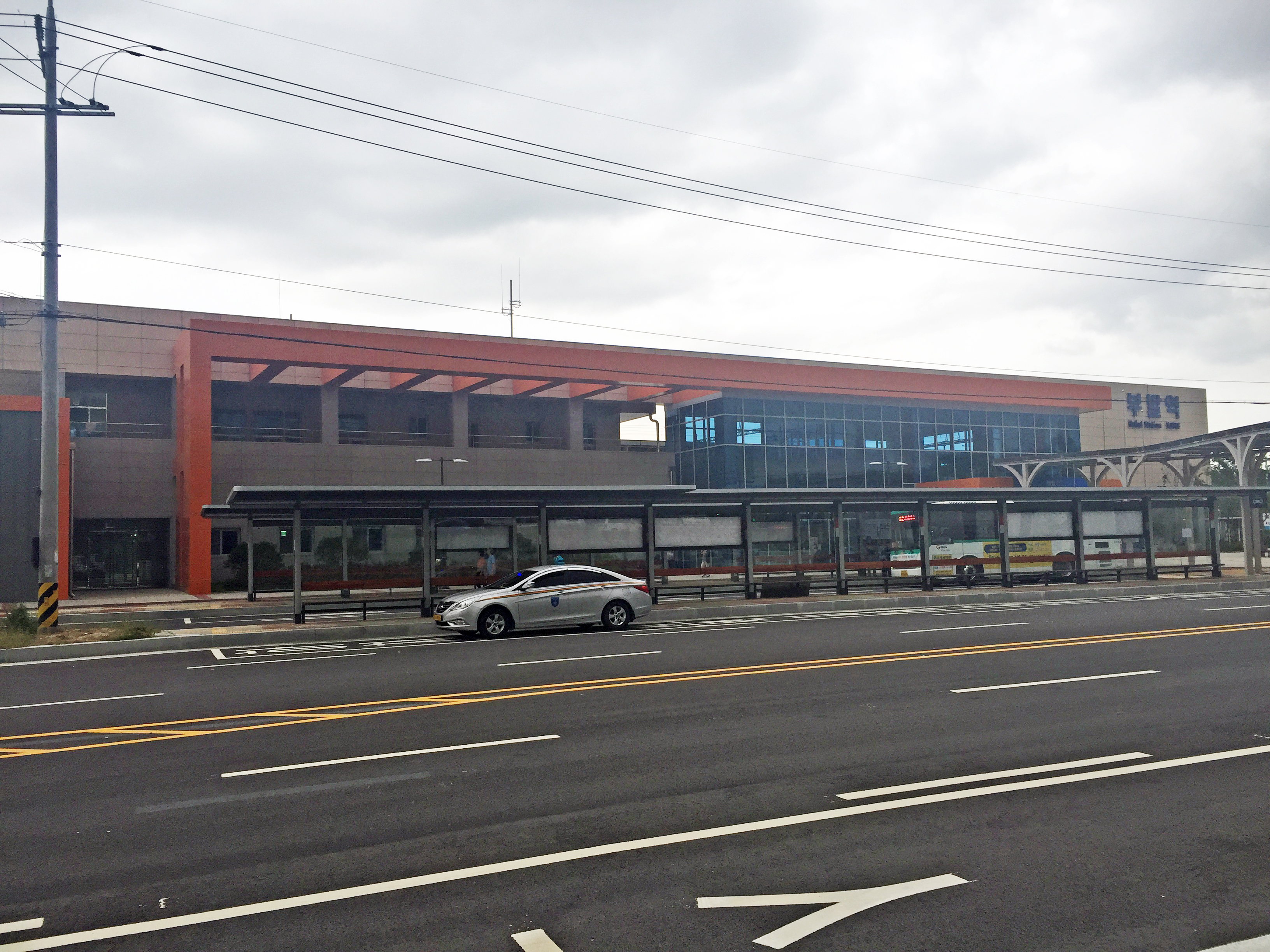 부발역 외관